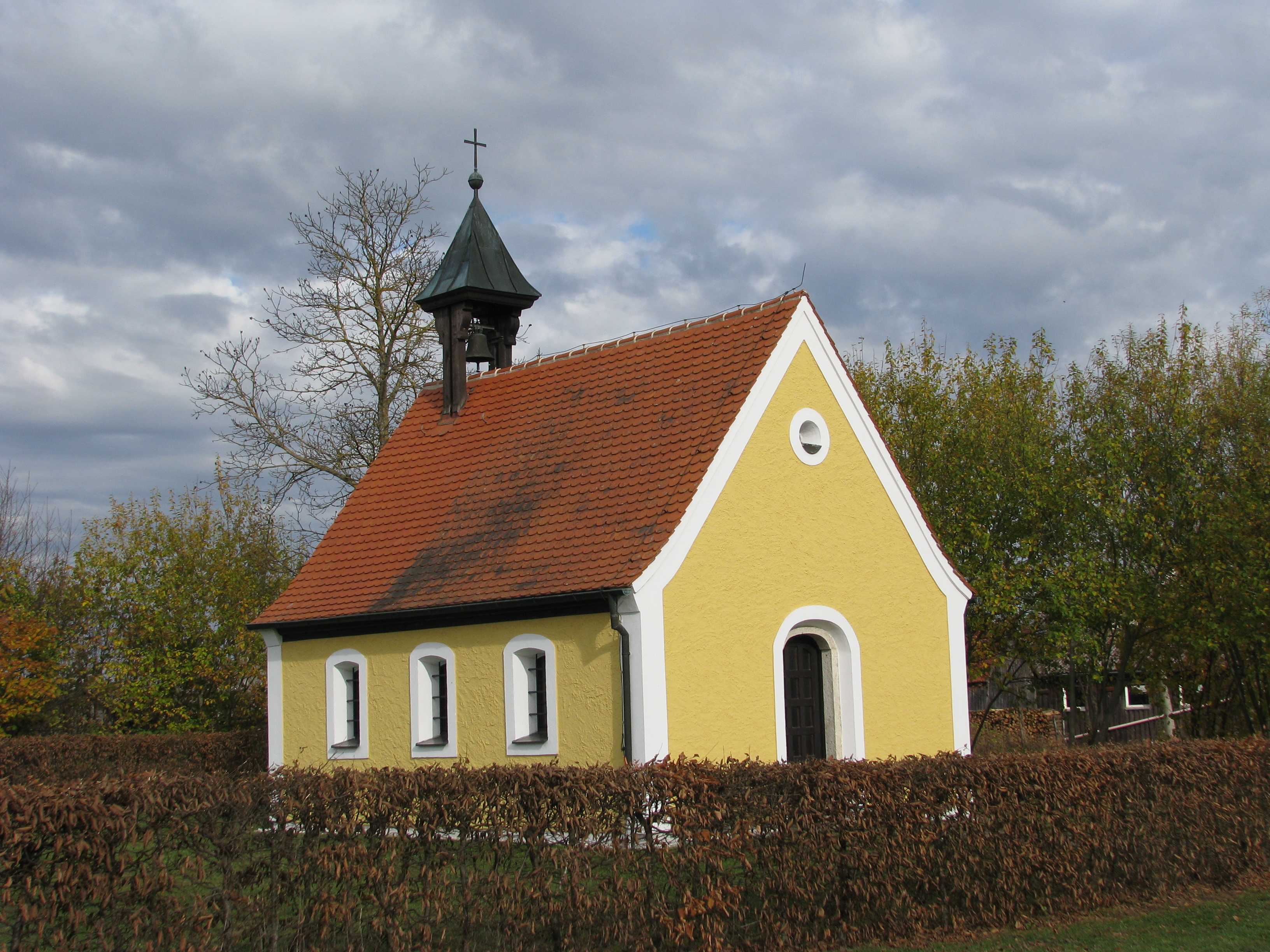 Kaldorf, Ortsteil von Beilngries im Landkreis Eichstätt, Ortskapelle